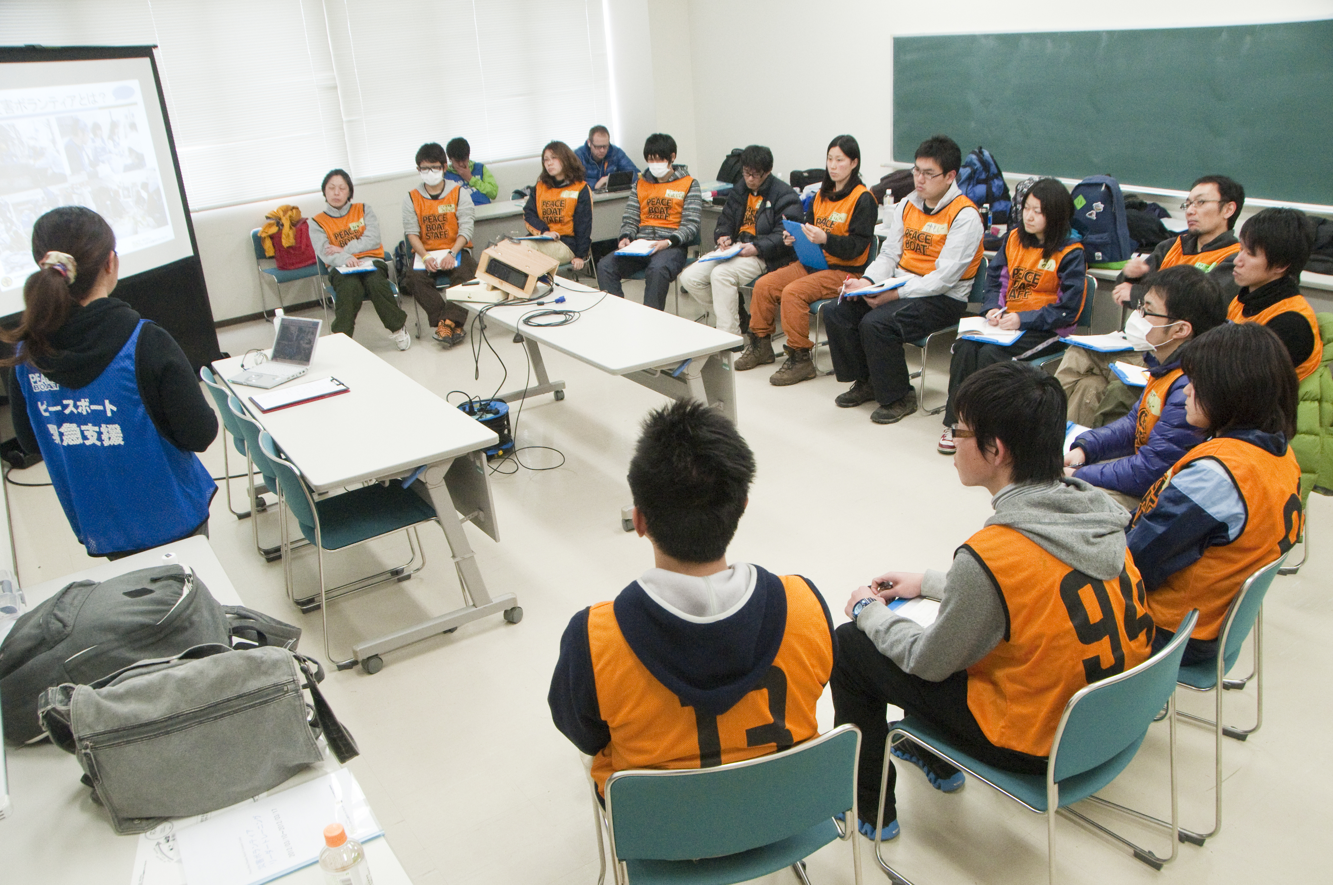 災害ボランティアトレーニングの様子。